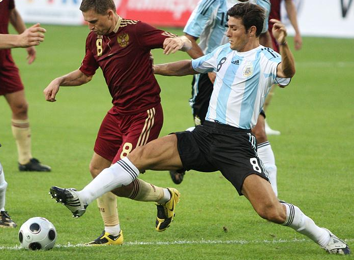 Javier Zanetti con la maglia della nazionale argentina ruba palla ad un giocatore della Russia